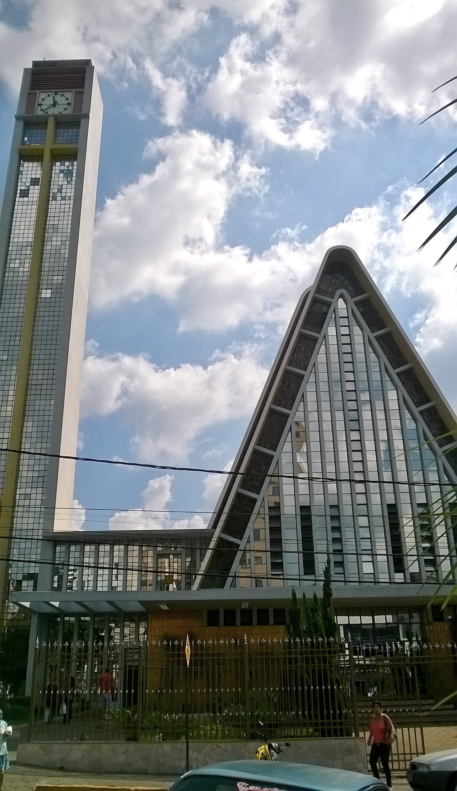 Igreja Nossa Senhora da Piedade, localizado na cidade de Pará de Minas, Minas Gerais.